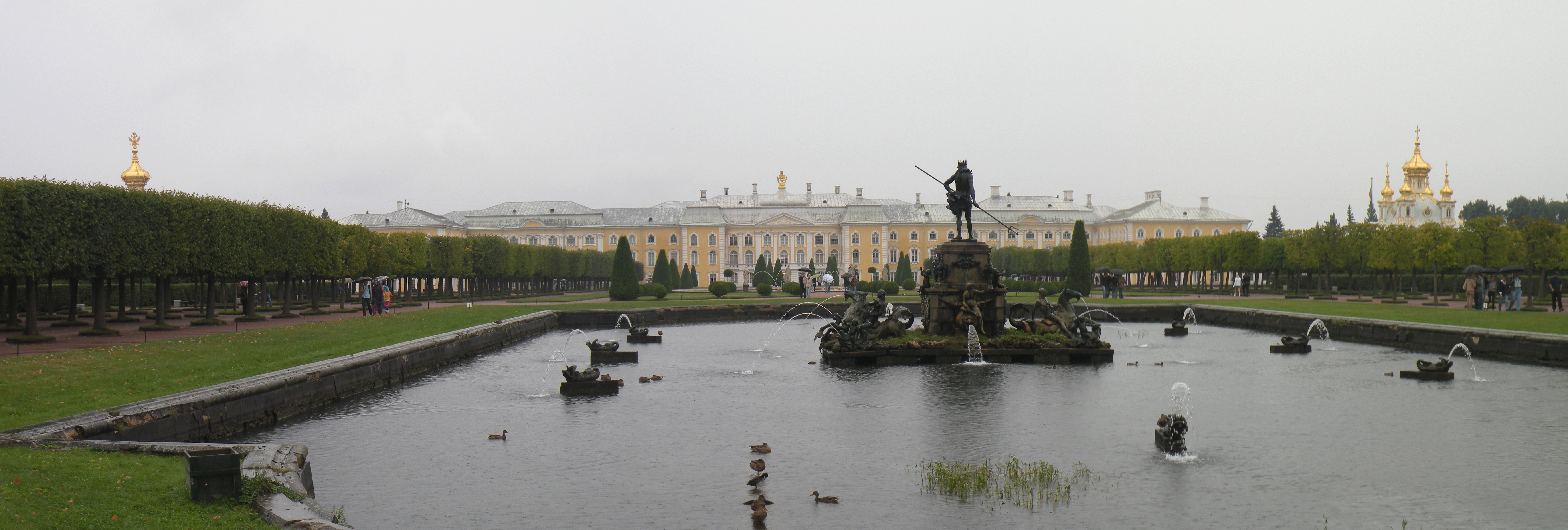 Петергоф.Большой дворец и фонтан Нептун в дождь.